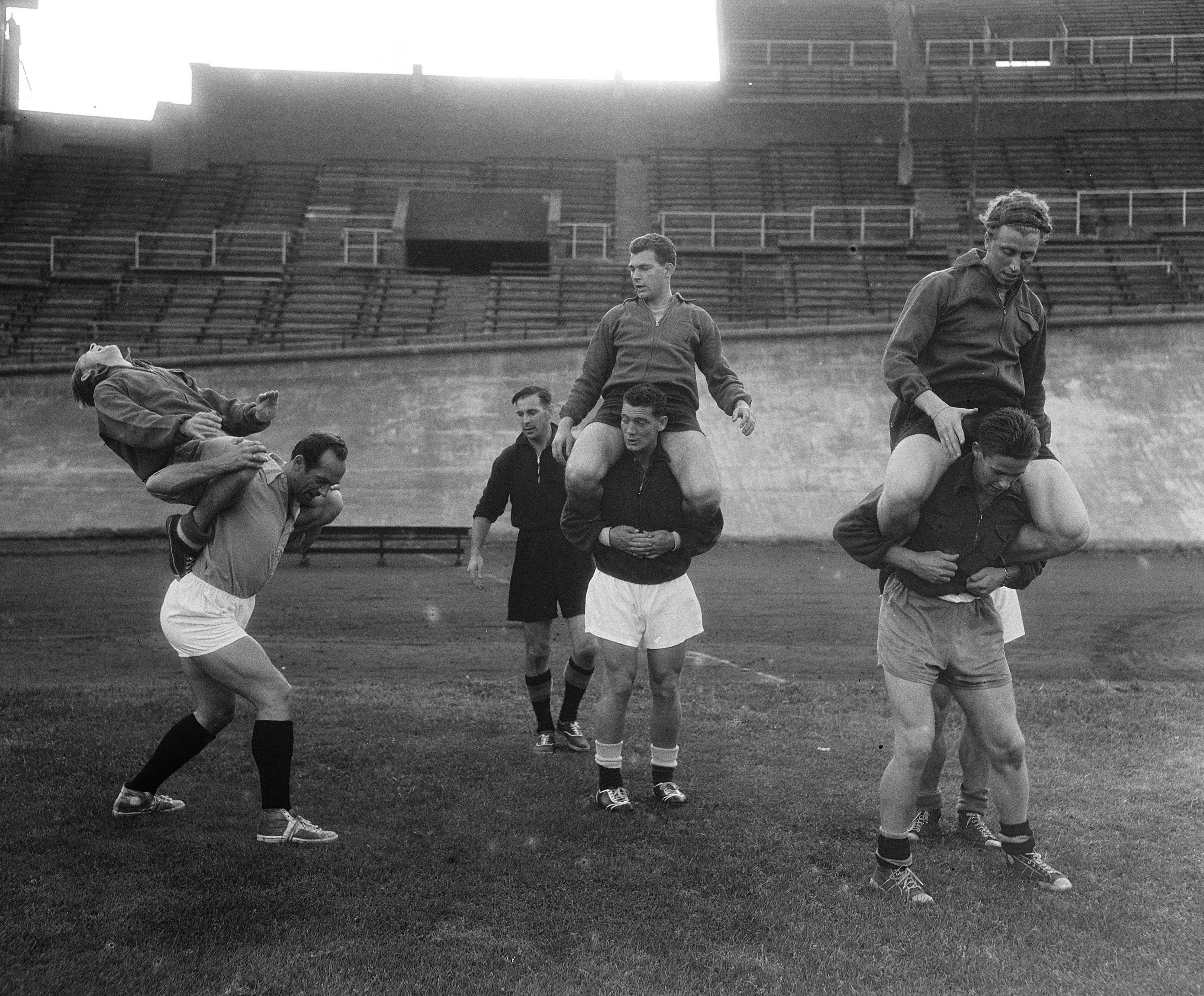 Collectie / Archief : Fotocollectie Anefo Reportage / Serie : [ onbekend ] Beschrijving : Training Nederlands elftal, gymnastiekoefeningen Datum : 6 september 1955 Locatie : Amsterdam, Noord-Holland Trefwoorden : sport, voetbal Fotograaf : Rossem, Wim van / Anefo Auteursrechthebbende : Nationaal Archief Materiaalsoort : Glasnegatief Nummer archiefinventaris : bekijk toegang 2.24.01.09 Bestanddeelnummer : 907-3131 Reacties Geplaatst door Maaike op 22 februari 2013 - 17:54. training o.l.v. Max Merkel (links, met zwarte voetbalkousen aan) Persoonsnamen: Max Merkel